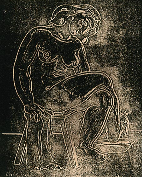 Femme à sa toilette, grattage sur encre de chine sur papier par Enrico Campagnola.